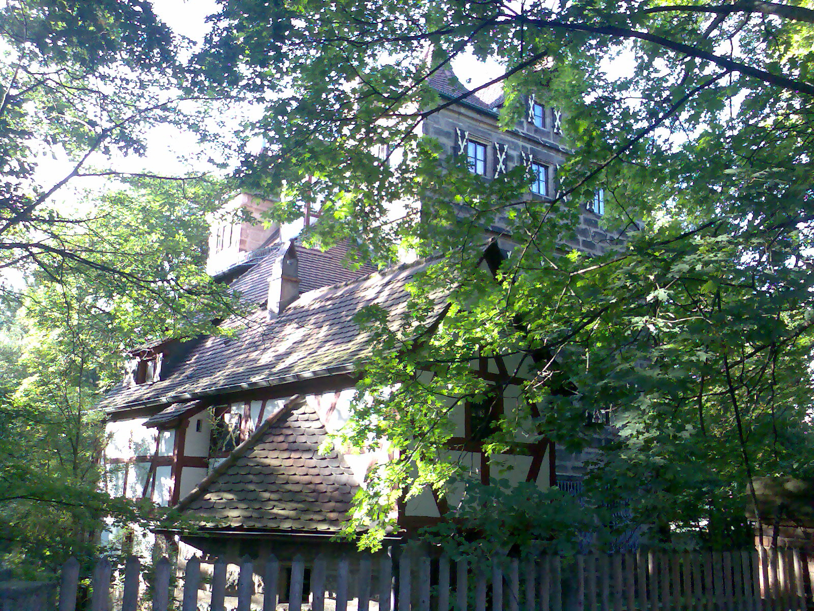 Petzenschloss in Nürnberg Lichtenhof